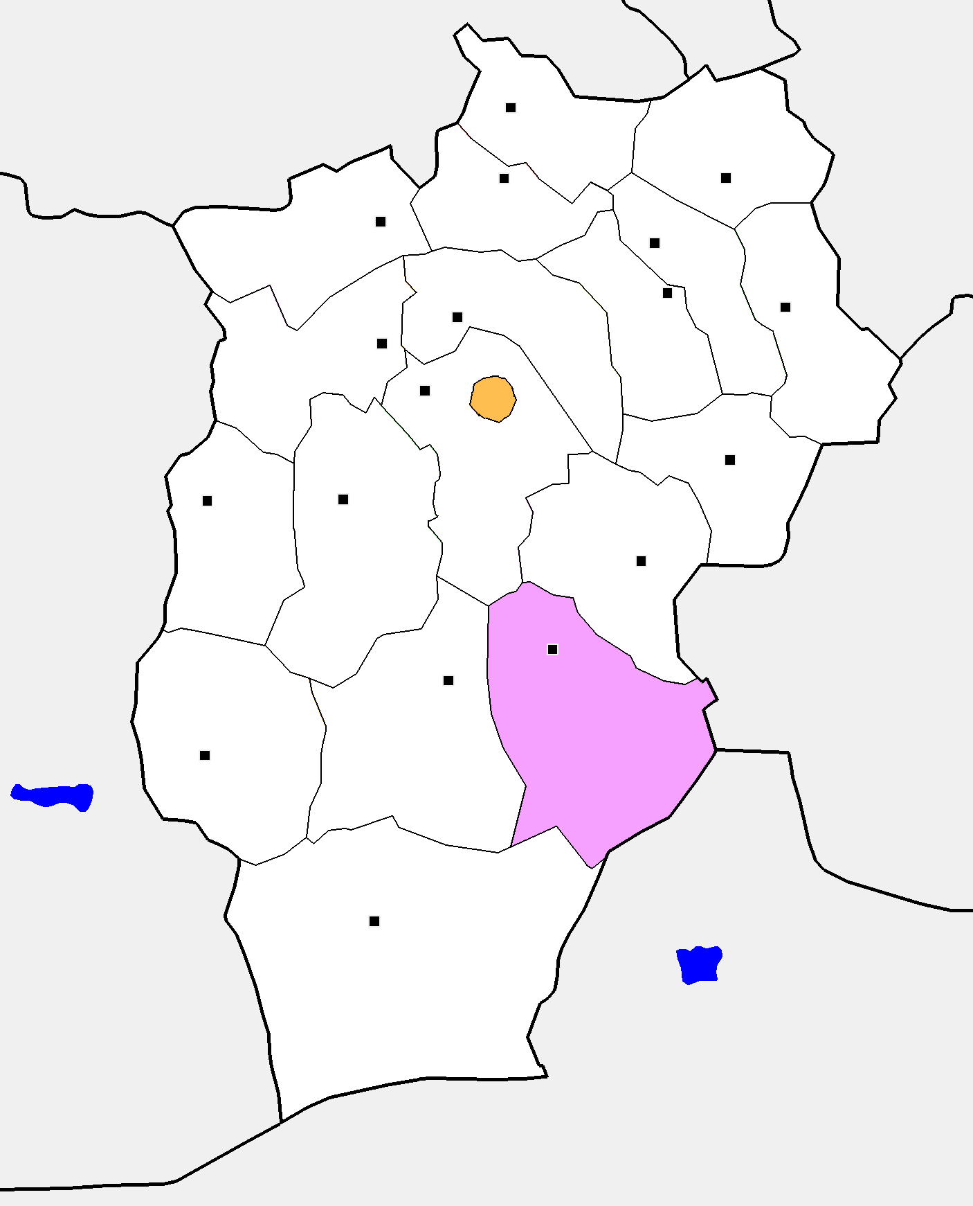 Монгол: Өвөрхангай аймгийн Төгрөг сумын байршил